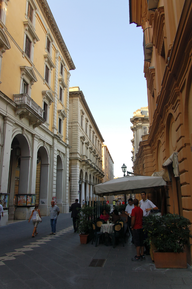 Chieti City 2011